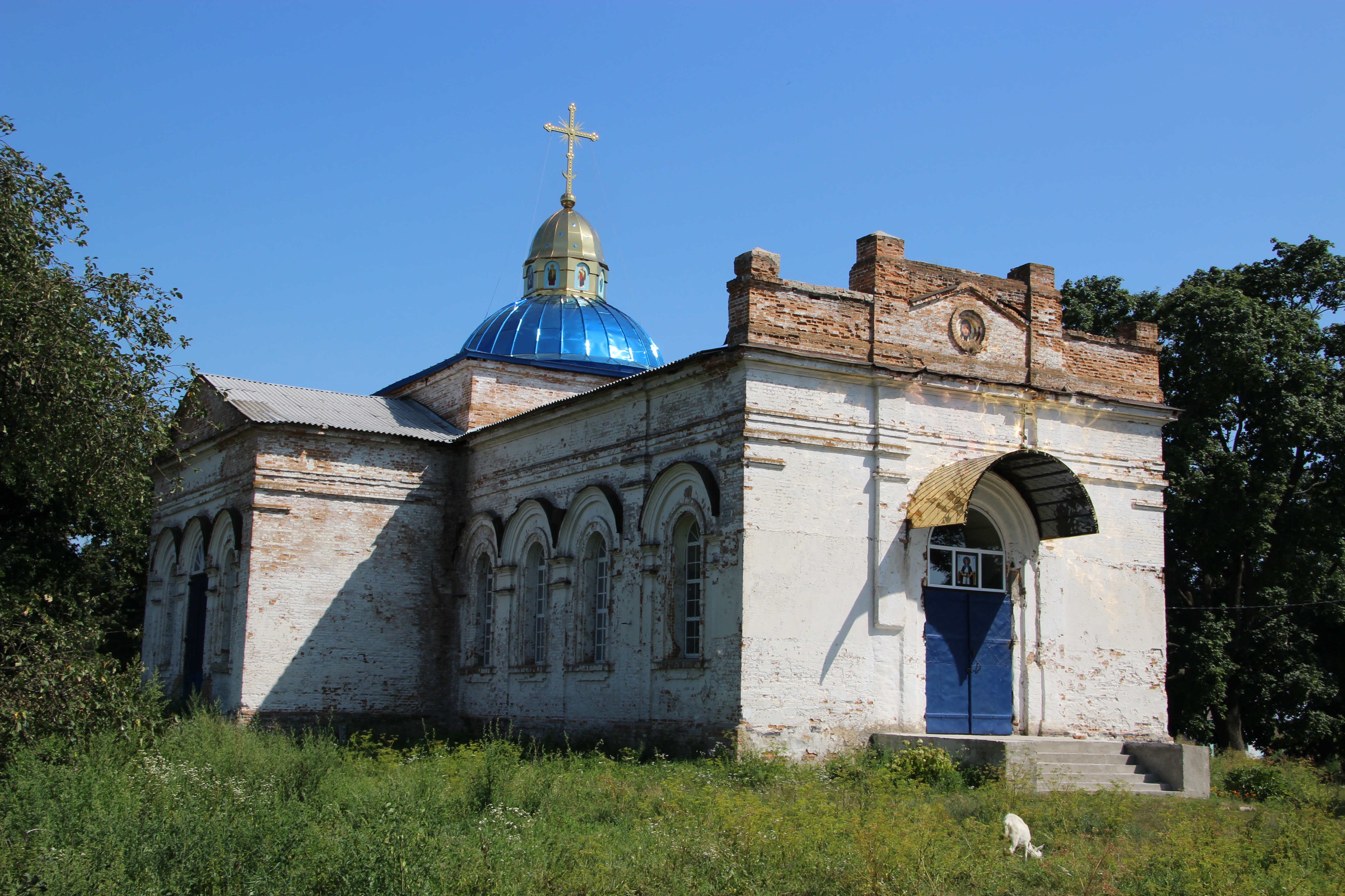 село В'язіве - Покровська церква